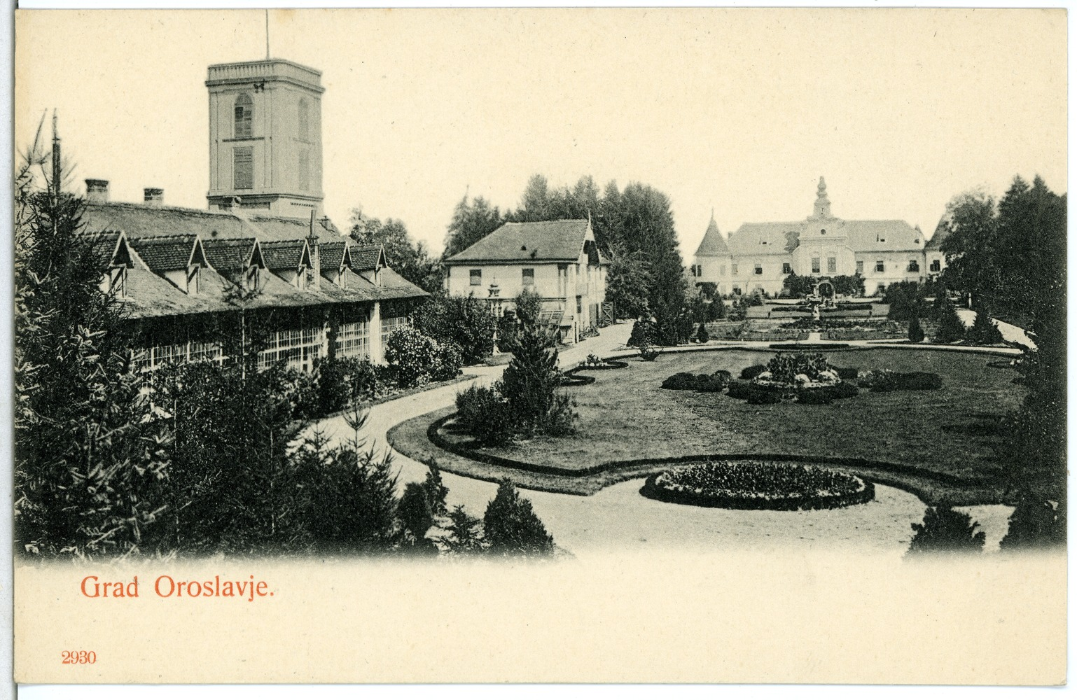 Grad Oroslavje; Schloß Diese Ansichtskarte stammt vom Kunstverlag Brück & Sohn aus Meißen ( Die Karte hat die eindeutige Nummer 02930 und ist in höherer Auflösung beim Verlag erhältlich. Sie wurde im Rahmen einer Kooperation zwischen Wikipedianern und dem Kunstverlag für Wikimedia Commons zur Verfügung gestellt.